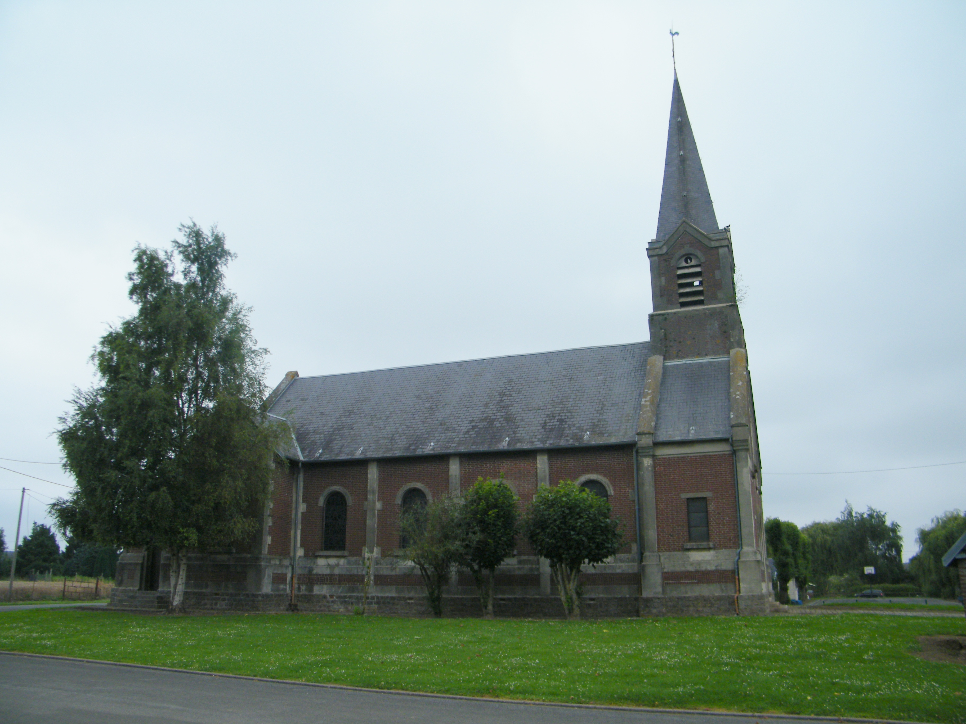 Eglise Saint-Martin de Belloy-en-Santerre.